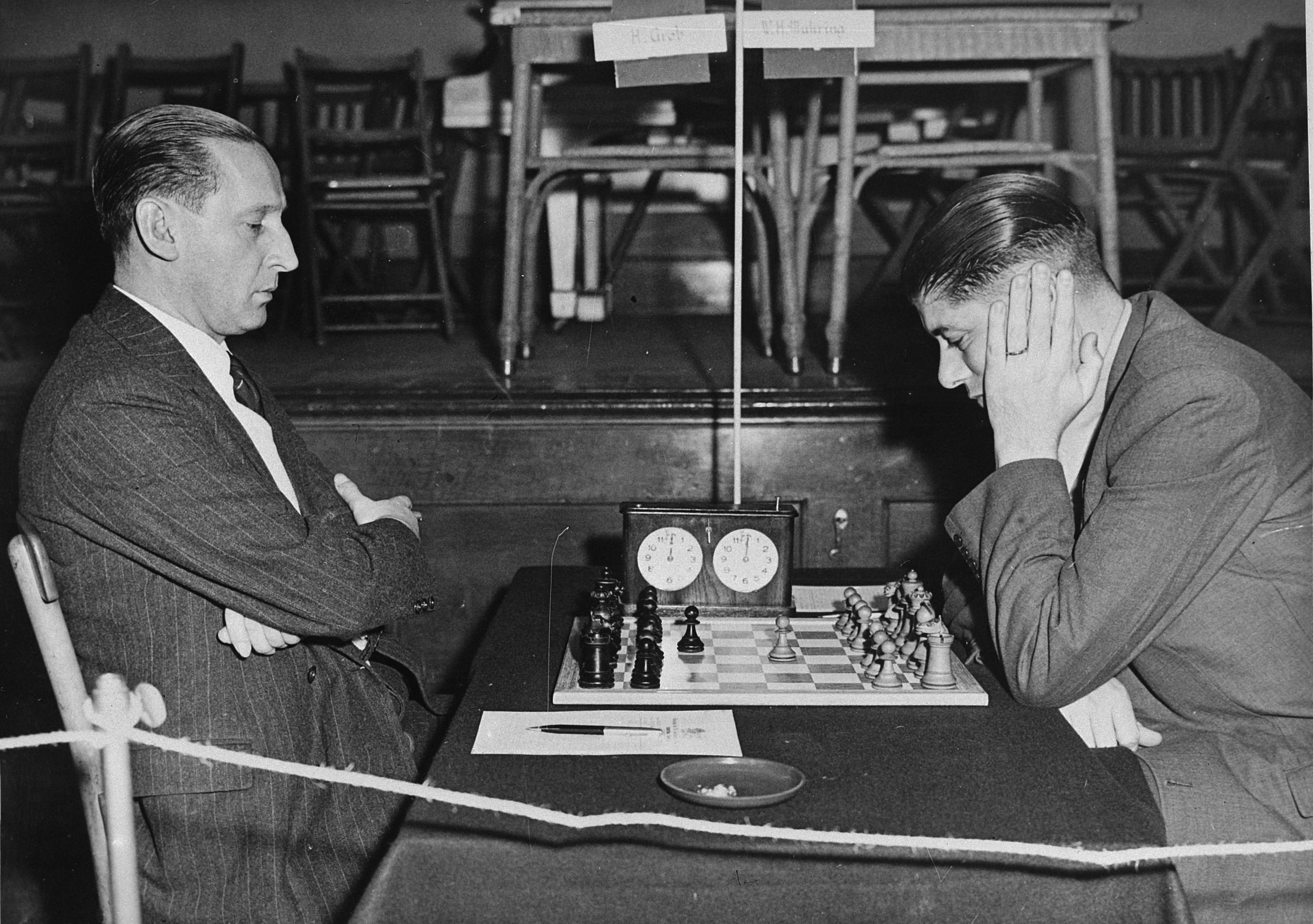 Collectie / Archief : Fotocollectie Anefo Reportage / Serie : [ onbekend ] Beschrijving : Schaaktoernooi. Hastings, 29 Dec. 1947 Henri Grob vs. Willem Muhring. Datum : 29 Dec. 1947 Trefwoorden : SCHAAKTOURNOOI Fotograaf : Fotograaf Onbekend / Anefo Auteursrechthebbende : Nationaal Archief Materiaalsoort : Glasnegatief Nummer archiefinventaris : bekijk toegang 2.24.01.09 Bestanddeelnummer : 902-5313